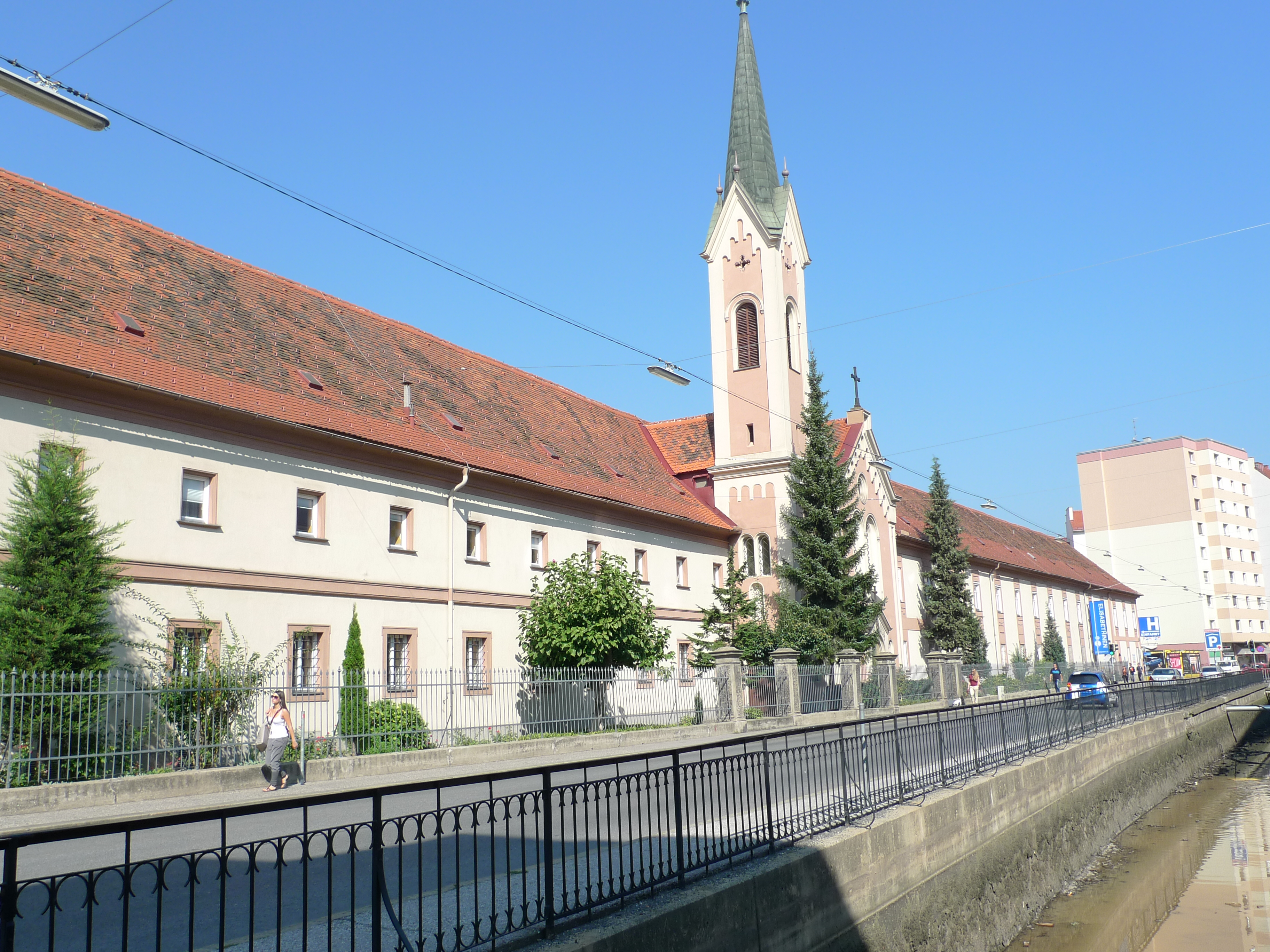 Elisabethinenkloster und alter Krankenhaustrakt mit Ummauerung und Kleindenkmälern